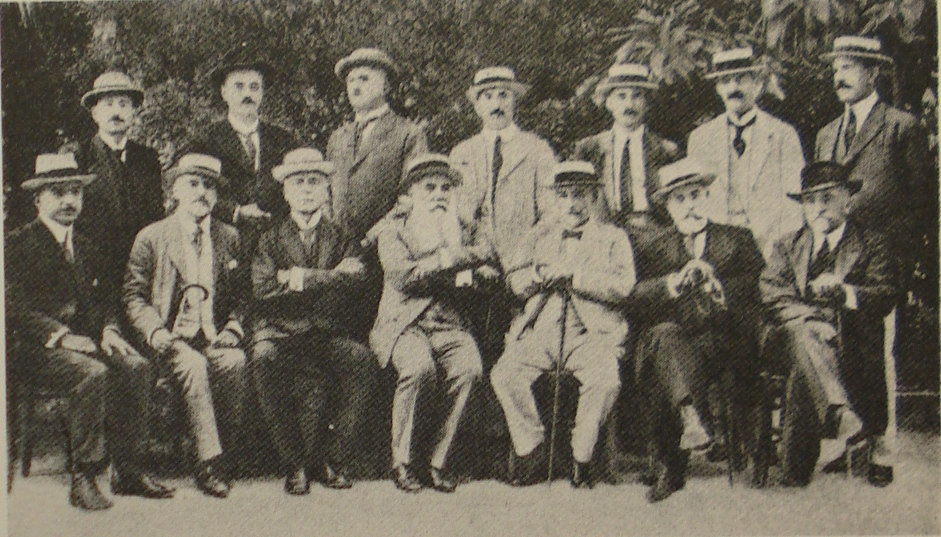 sastavljači Krfske deklaracije